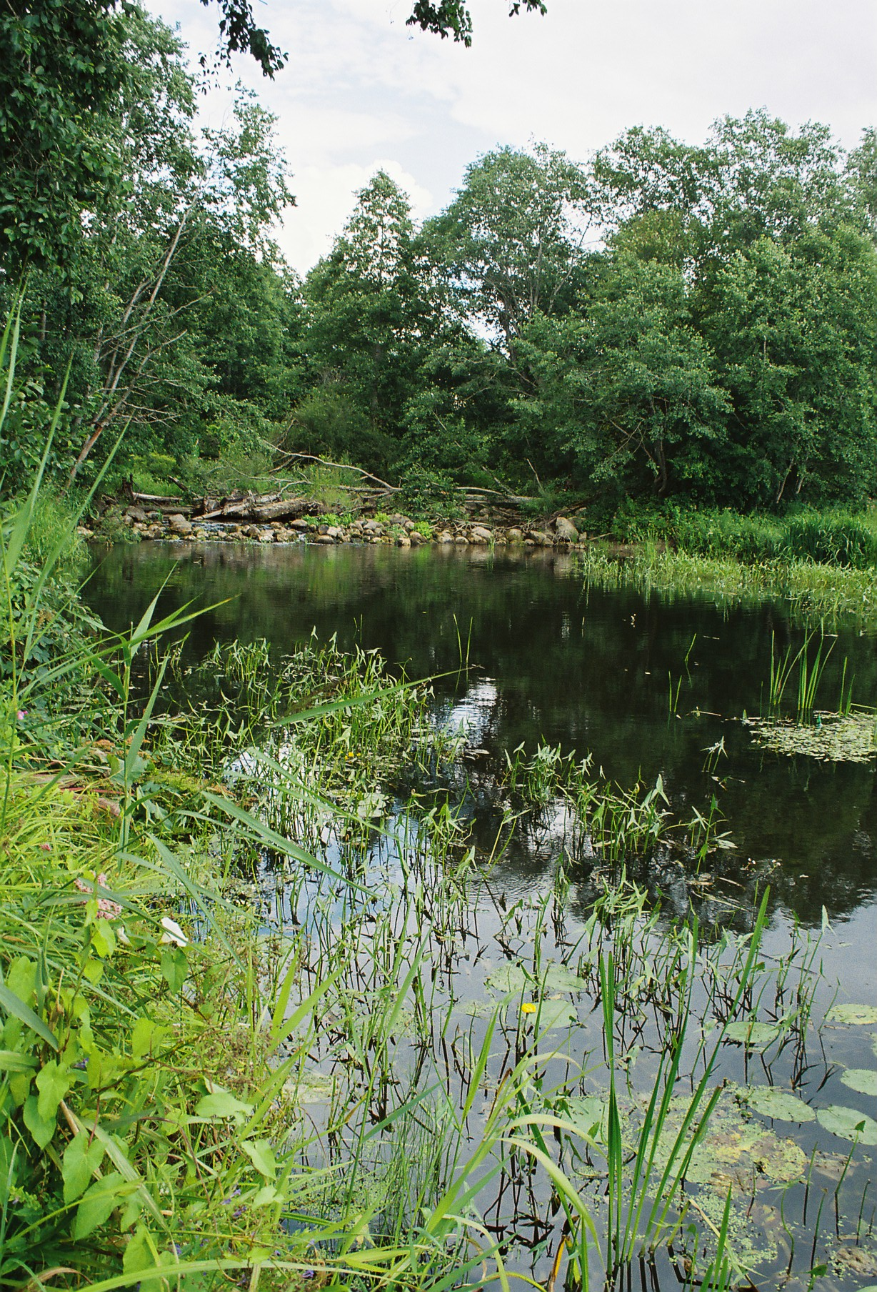 Amme jõgi